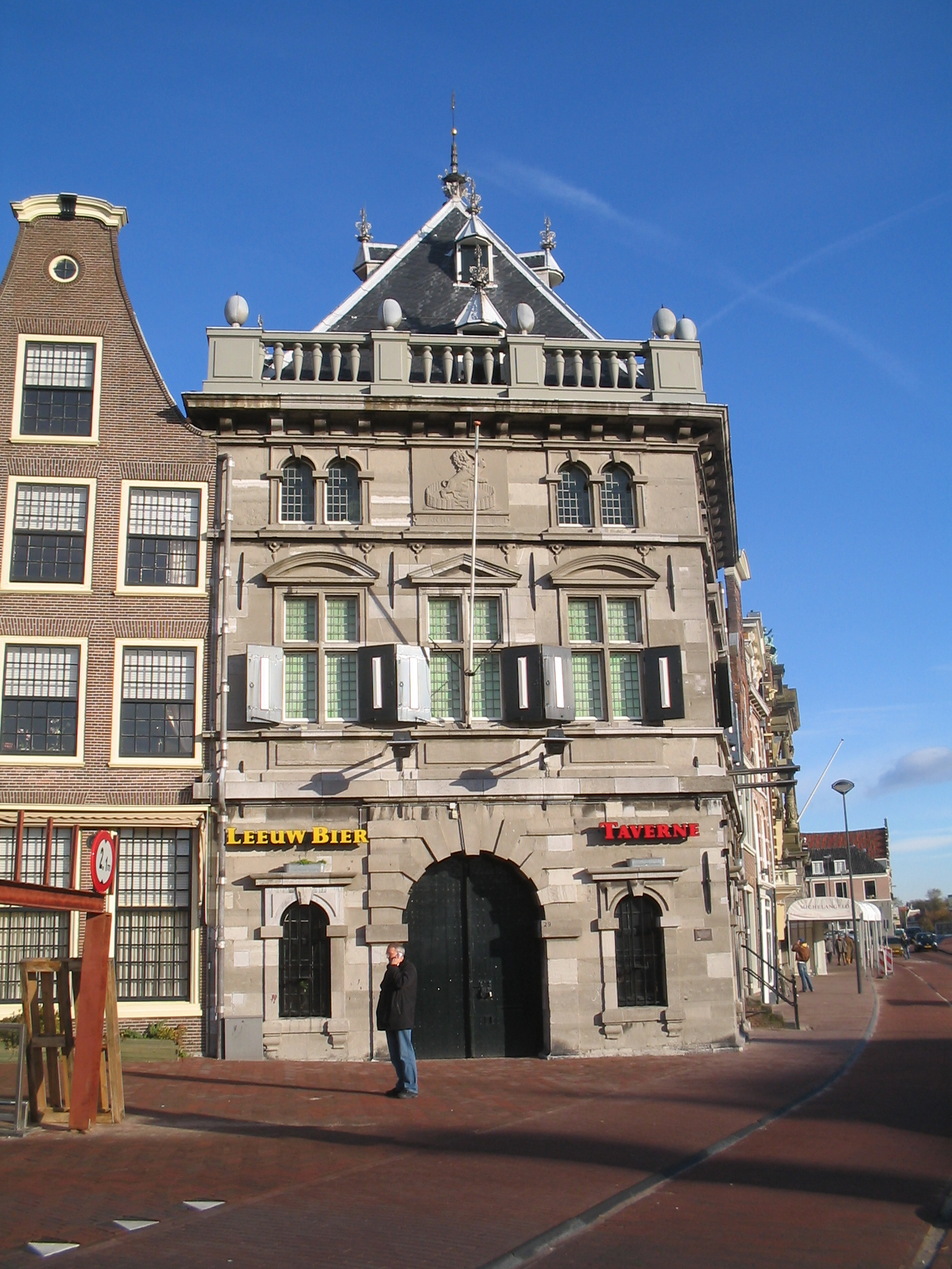 Haarlem, De Waag, november 2005